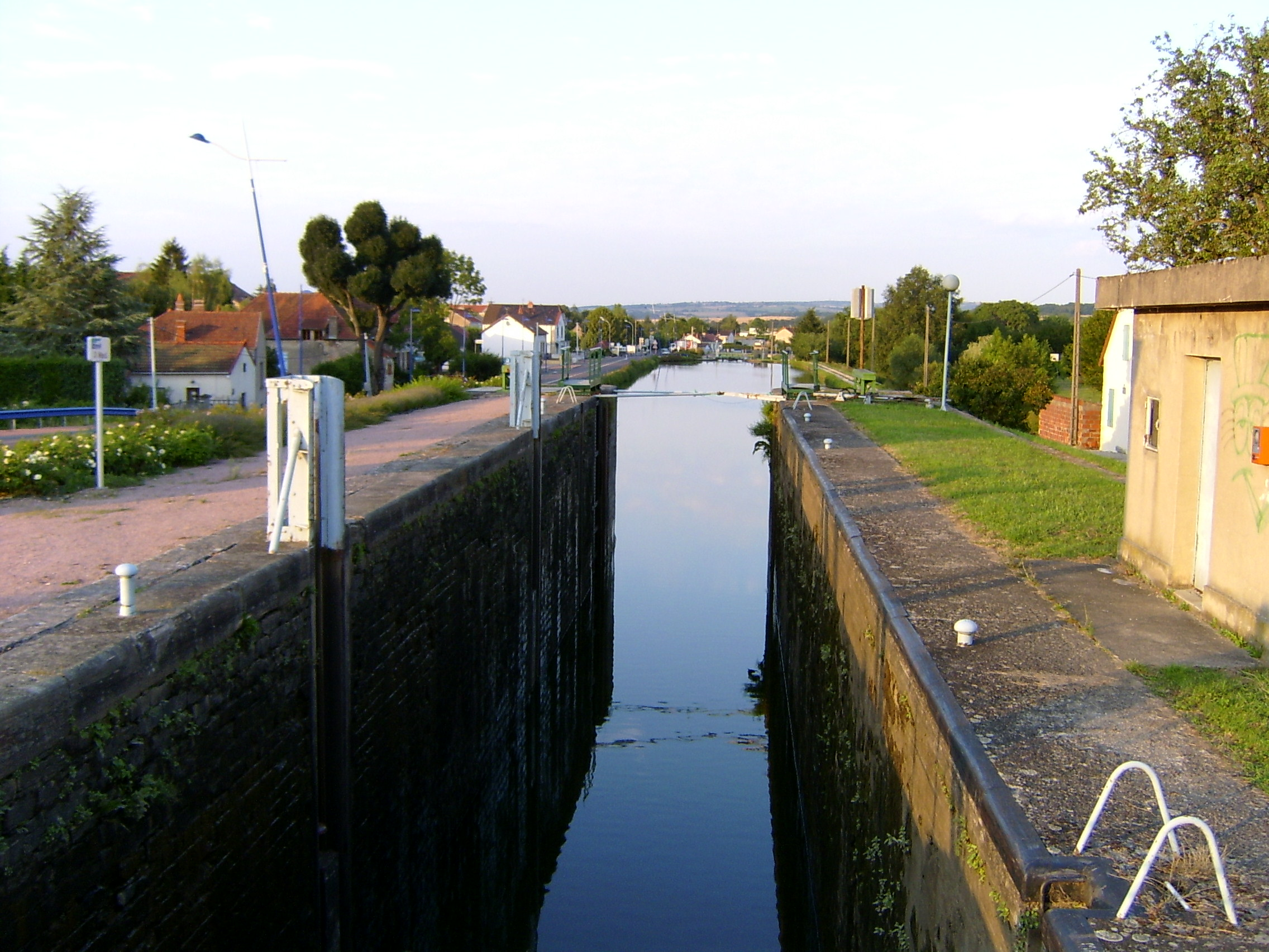 Ecluse nr.1 te Ecuisses in het Canal-du-Centre.